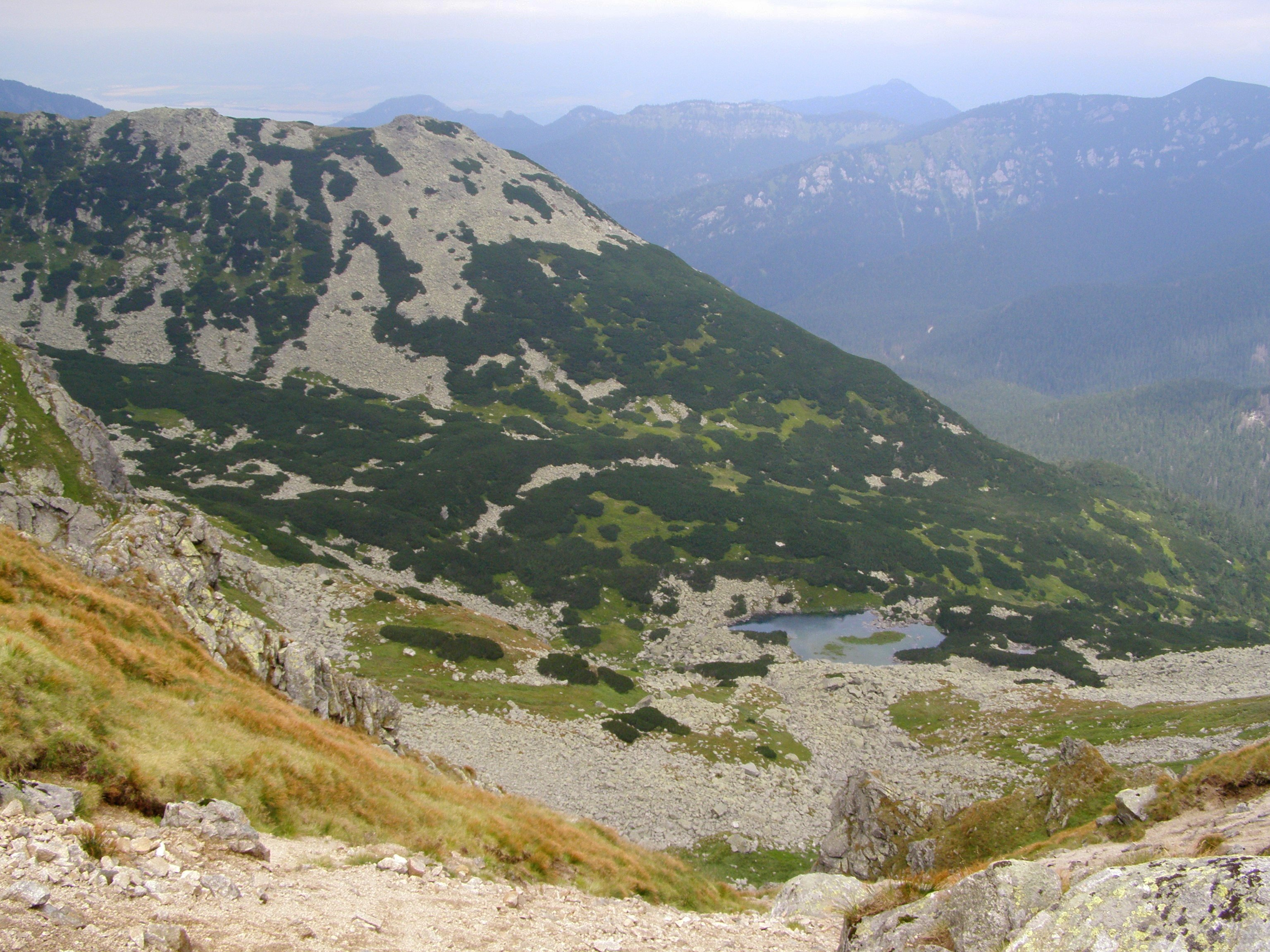 Nízké Tatry, Ďumbierské Tatry, Lukové pliesko, pohled od jiho z východního úbočí vrcholu Chopok (2024 m)